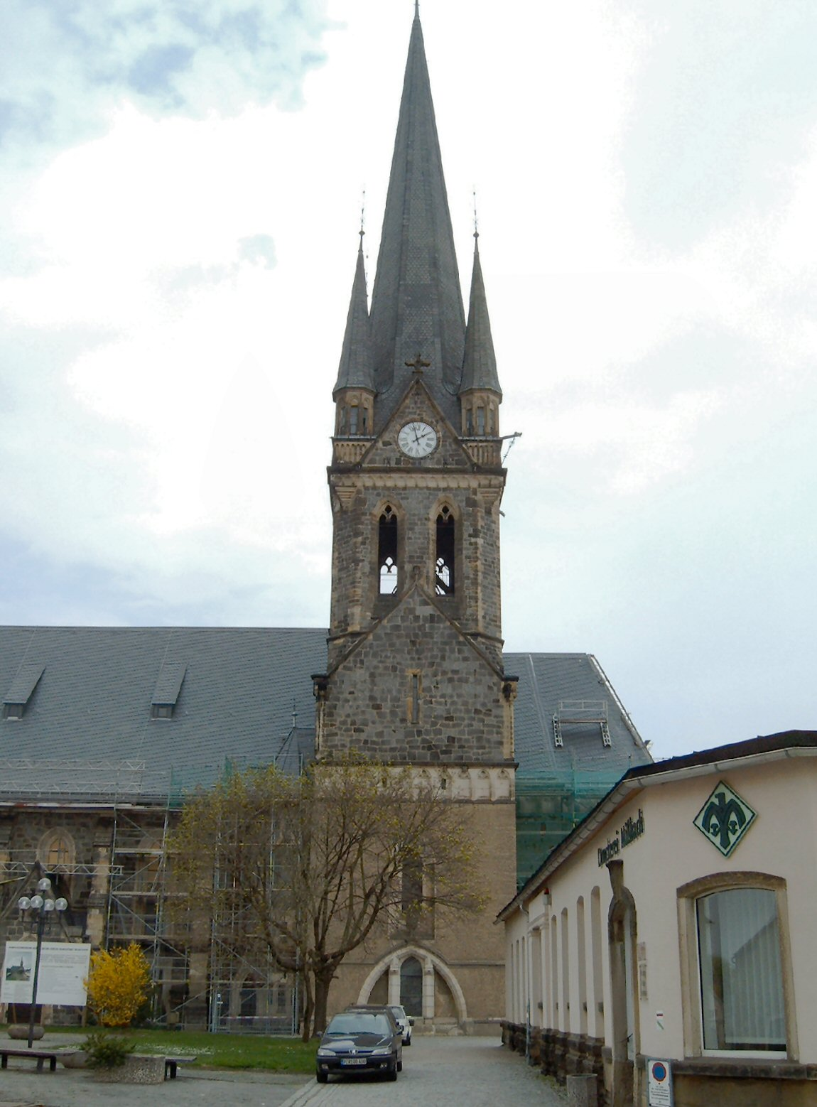 Jacobikirche in Neustadt in Sachsen. Im Vordergrund Druckerei Mißbach